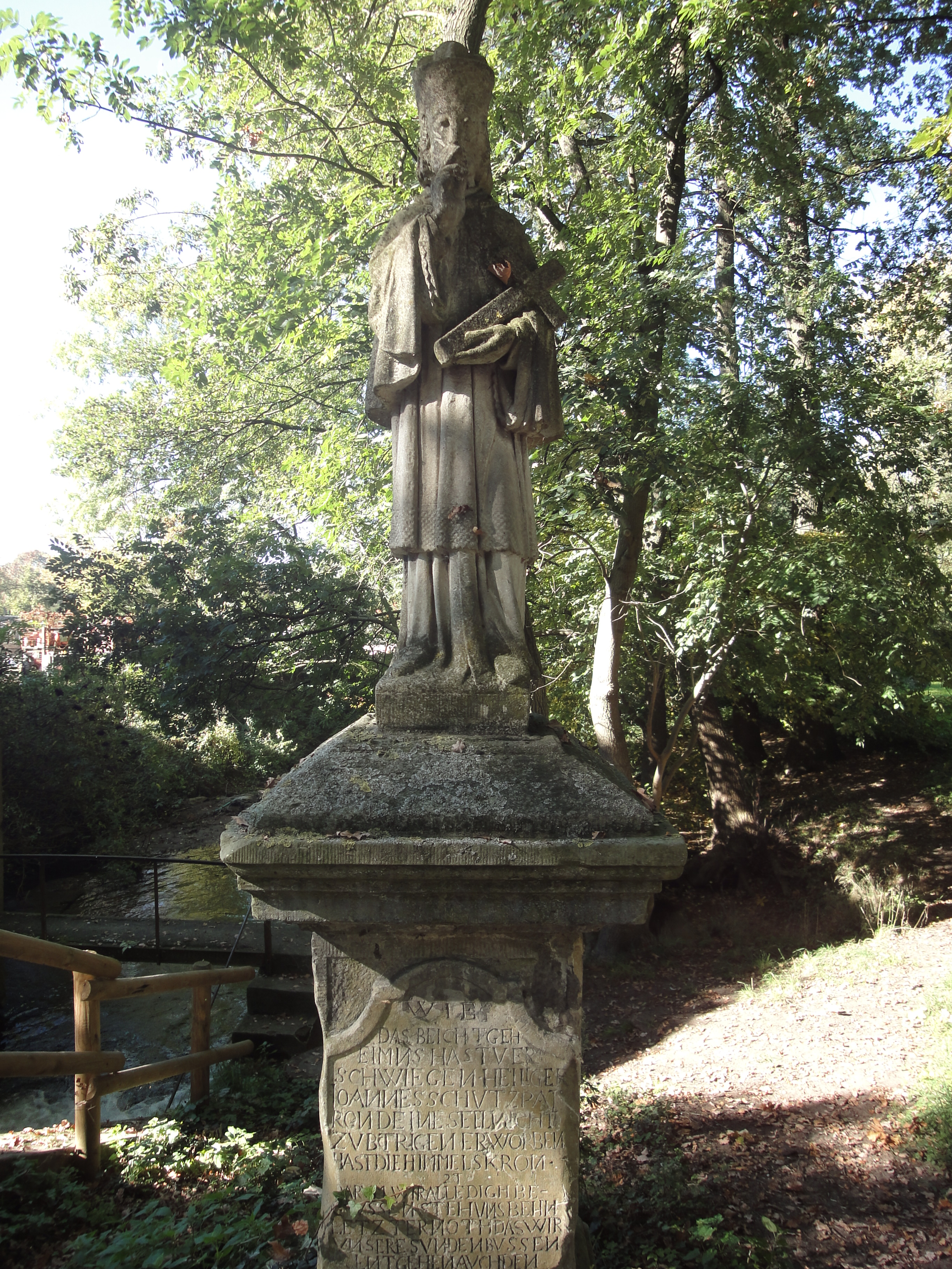 Nepomukstatue am Ölbach in Verl